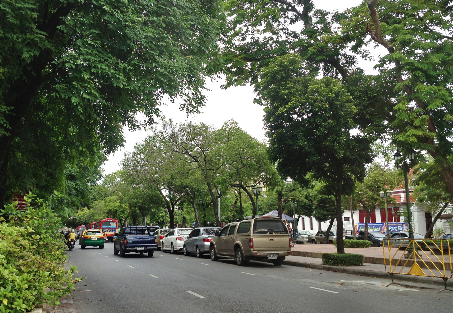 SiriPhong,Samran rat, phra Nakhon, Bangkok